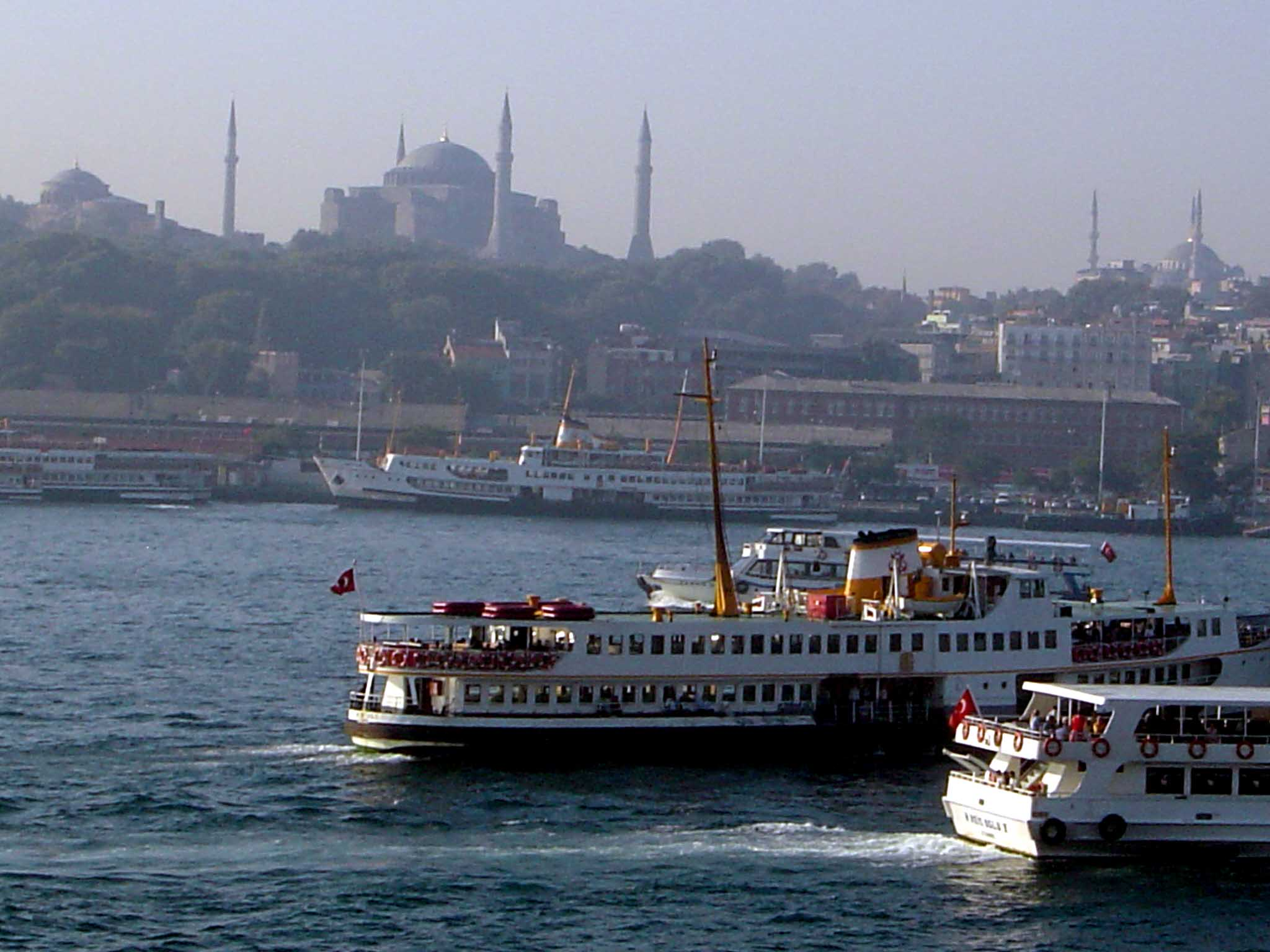 Sujet: Istanbul vum Bosporus aus gesinn (2005).